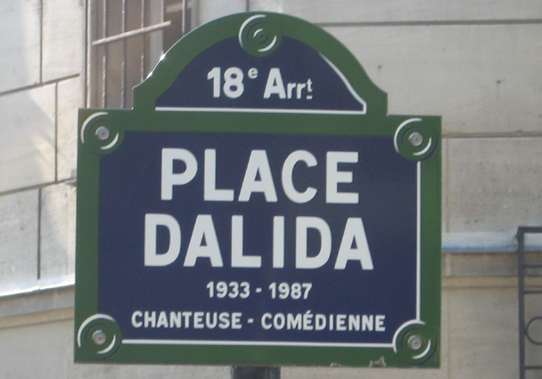 Bord van Place Dalida.